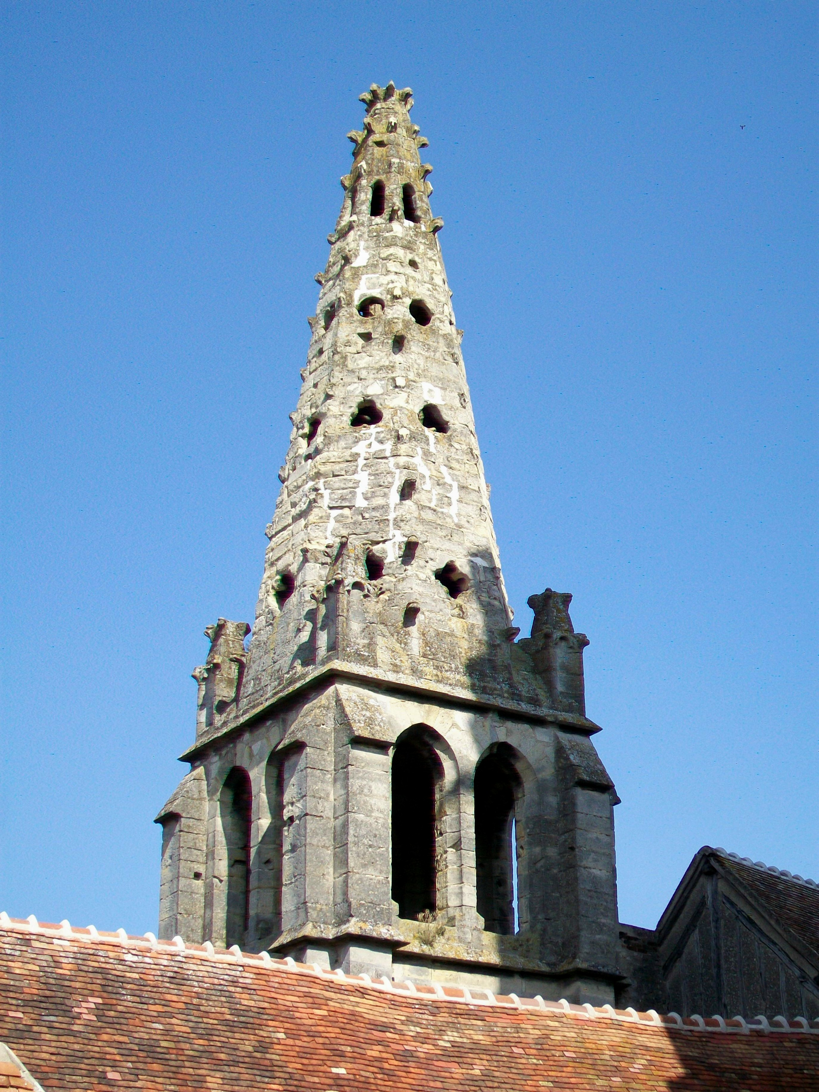 L'étage supplémentaire à caractère utilitaire et la pyramide gothique avec quatre pinacles sur le clocher roman, ajoutés entre 1430 et 1470 par manque de moyens pour l'élévation d'un nouveau clocher.